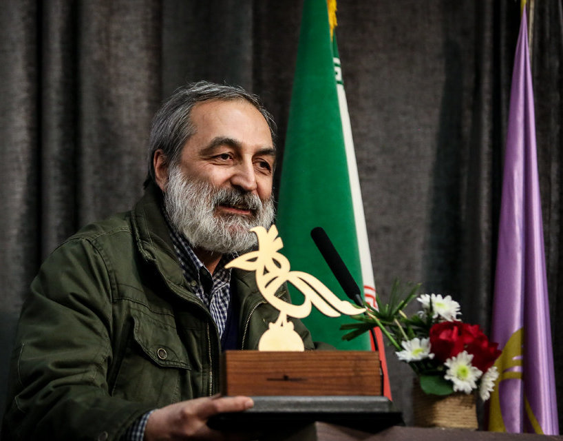 روبرت صافاریان در هفتمین جشن کتاب سال سینما